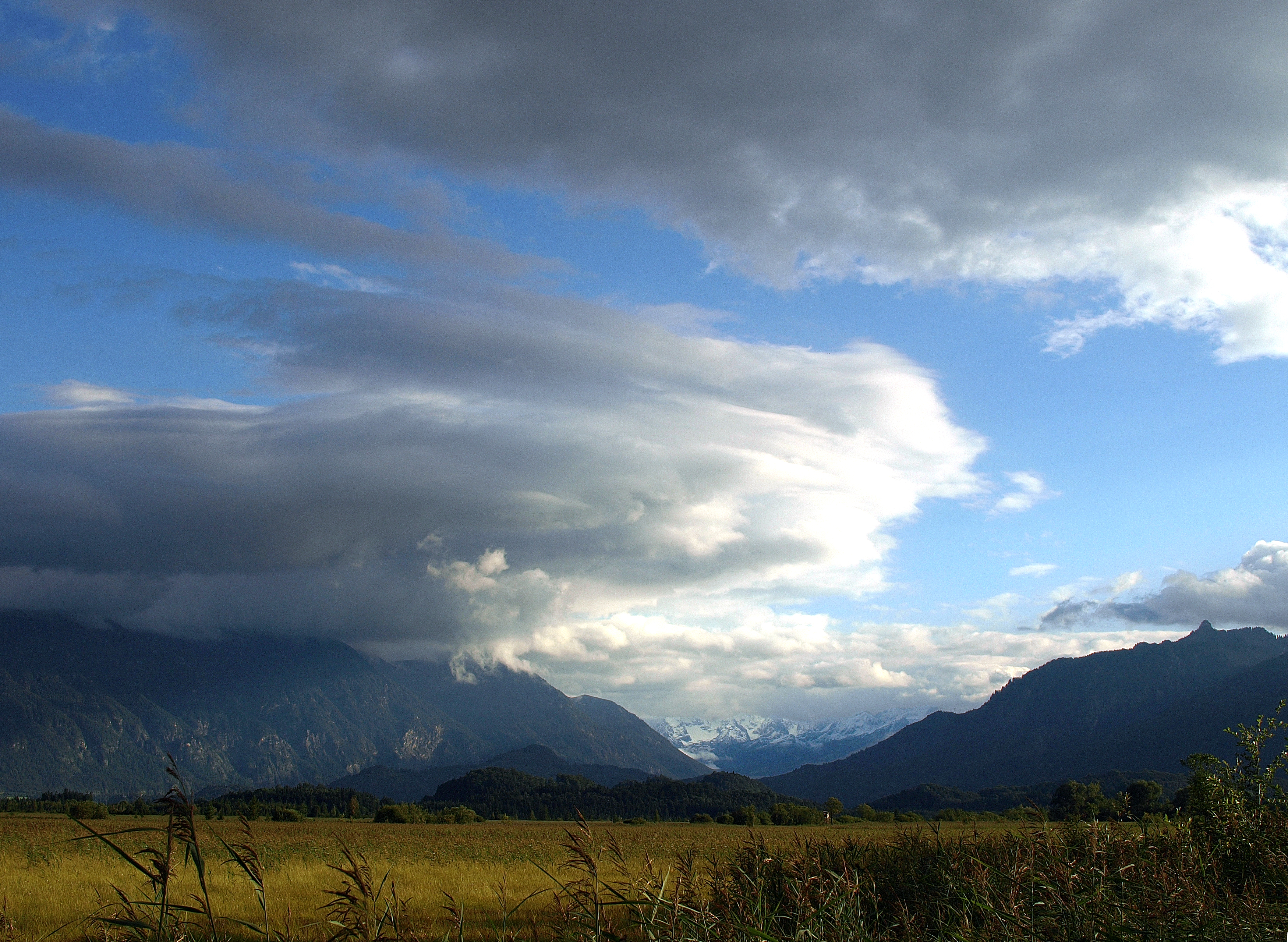 Das Alpentor vom Murnauer Moos in Richtung Walchensee und Wettersteingebirge gesehen.